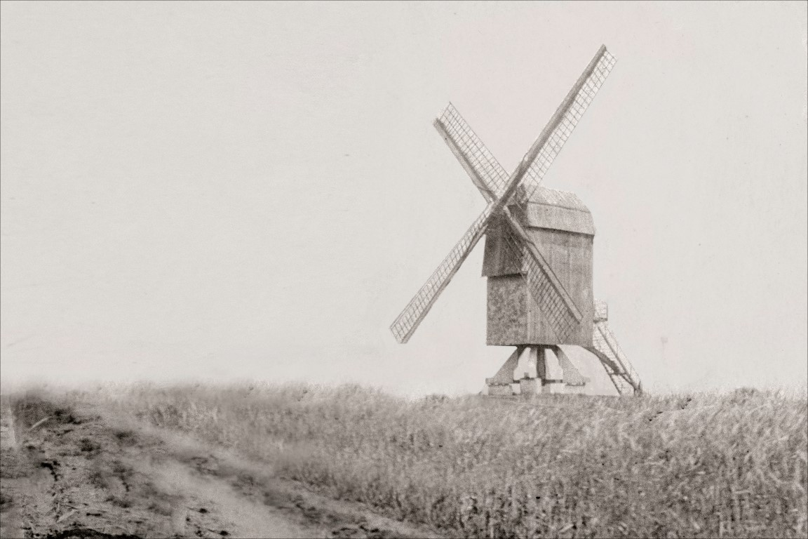 De Kattemmolen